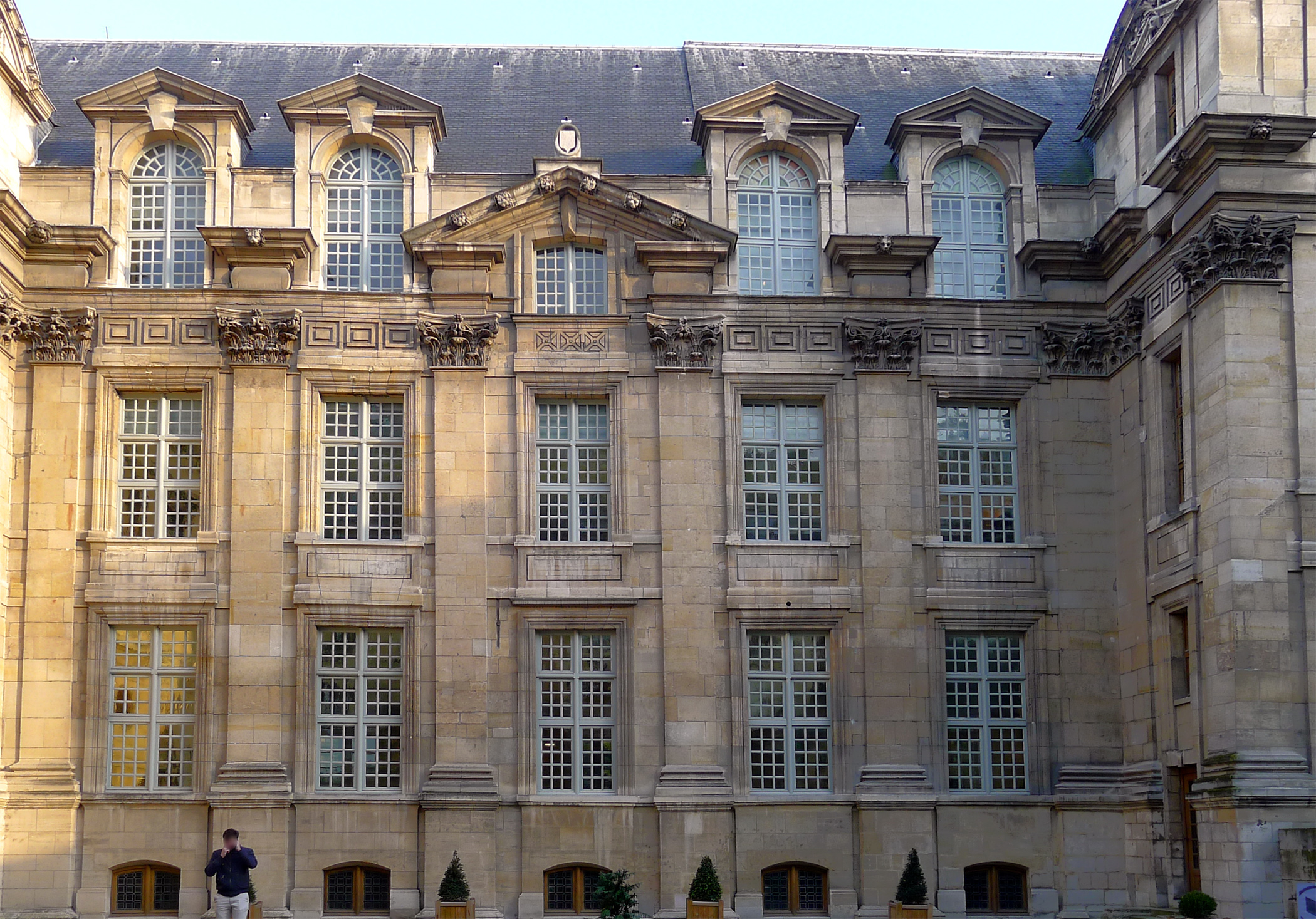 Hôtel d'Angoulème Lamoignon - Paris IV .